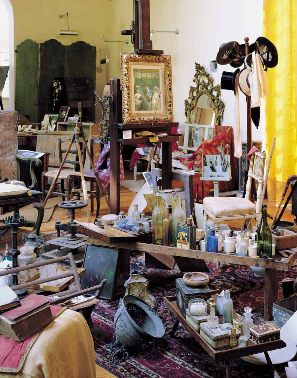 Interno dello Studio/Atelier del pittore Pompeo Mariani a Bordighera presso Villa Mariani